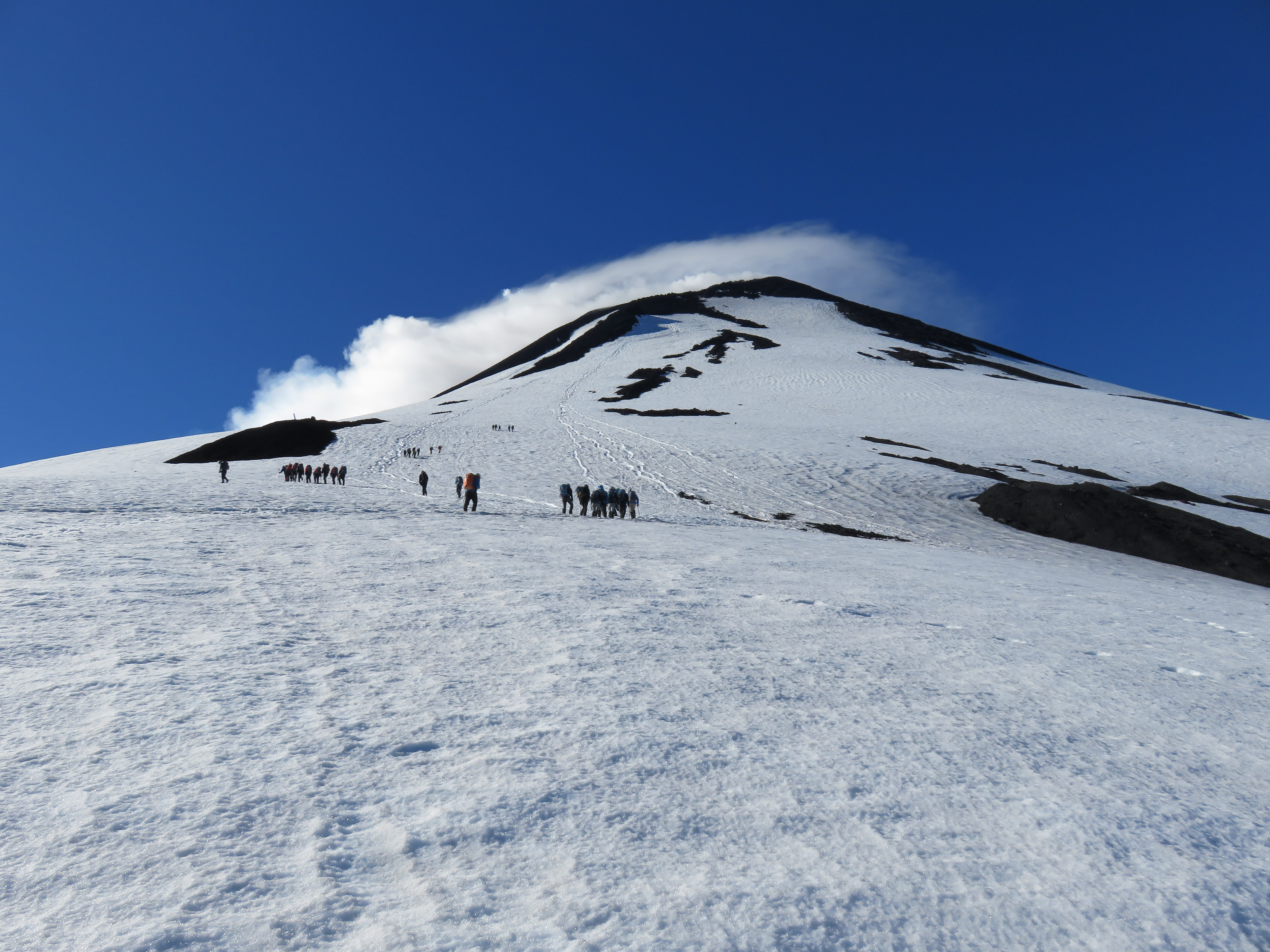 Bergwanderer auf dem Vulkan Villarrica